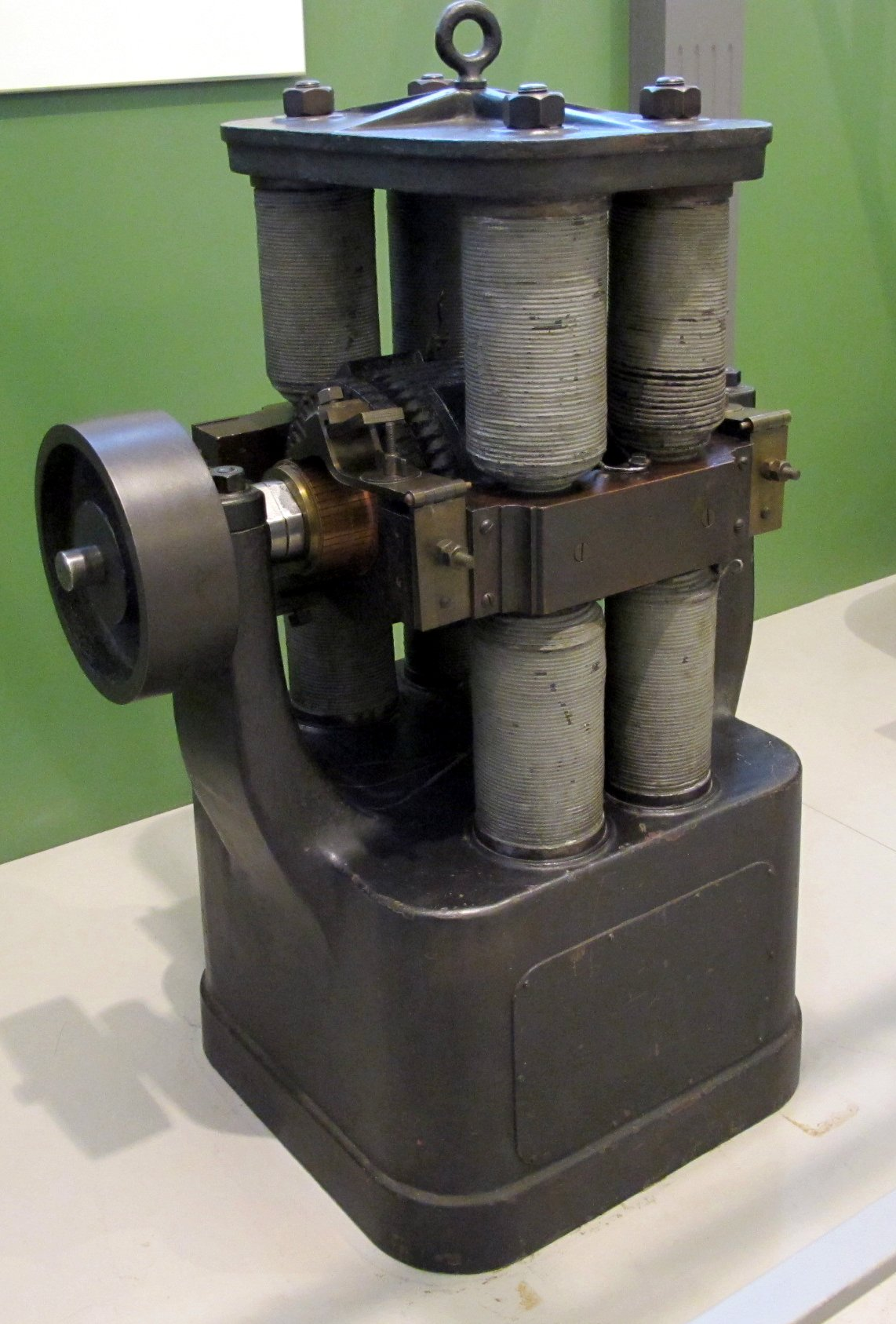 Gleichstrommaschine welche 1873 auf der Weltausstellung in Wien von der „Société des machines magnéto-électriques Gramme“ ausgestellt wird. Hermann Krupp kaufte sie für seine Metallwarenfabrik wo sie von 1874 bis 1895 elektrischen Strom für die galvanische Versilberung lieferte. Der Generator hat acht magnetische Pole und zwei Ringankerwicklungen. Der Läufer weist zwei getrennt Stromkreise auf. Baujahr: 1872 Hersteller: Gramme